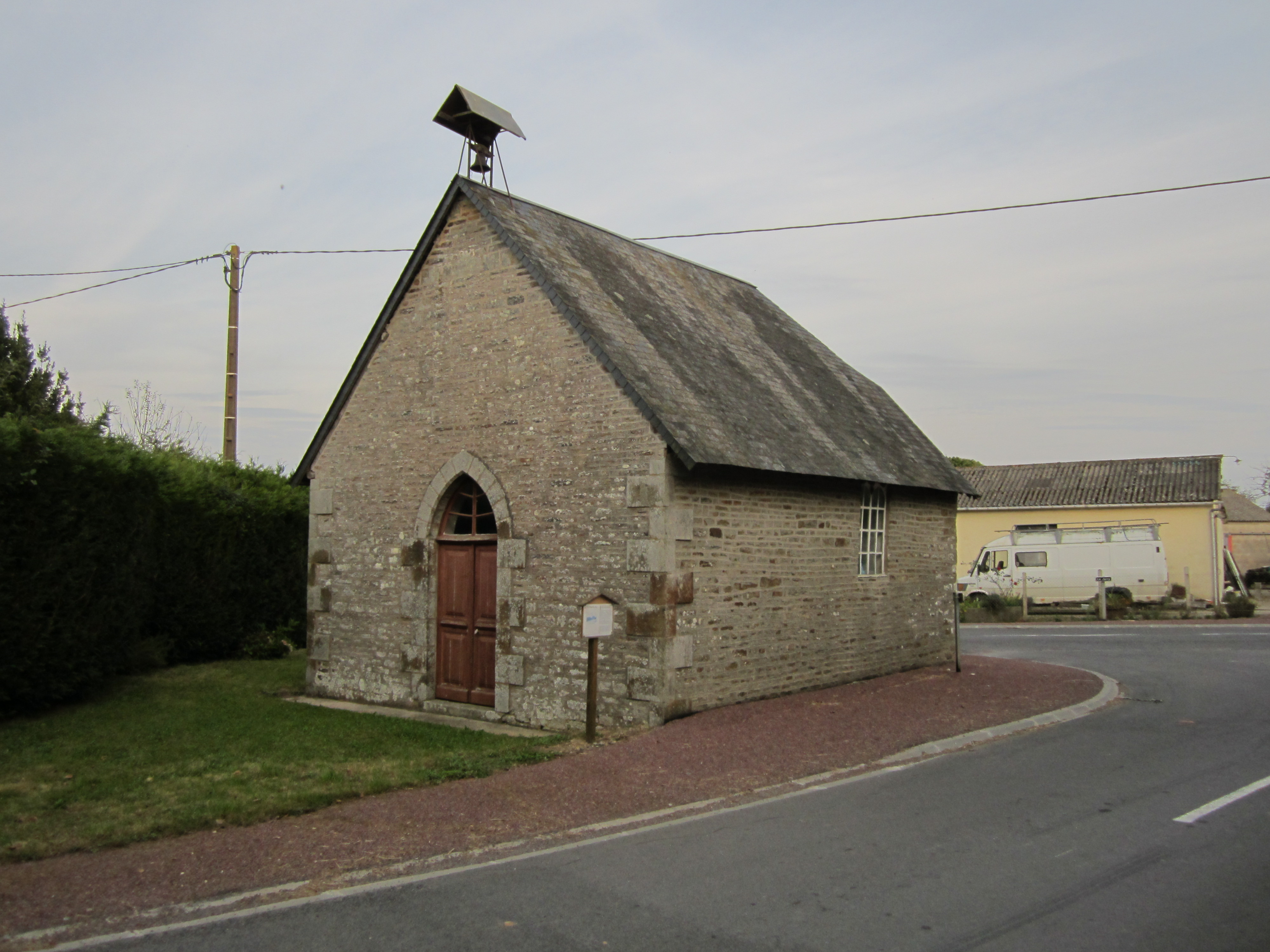 Saint-Cyr-du-Bailleul, Manche